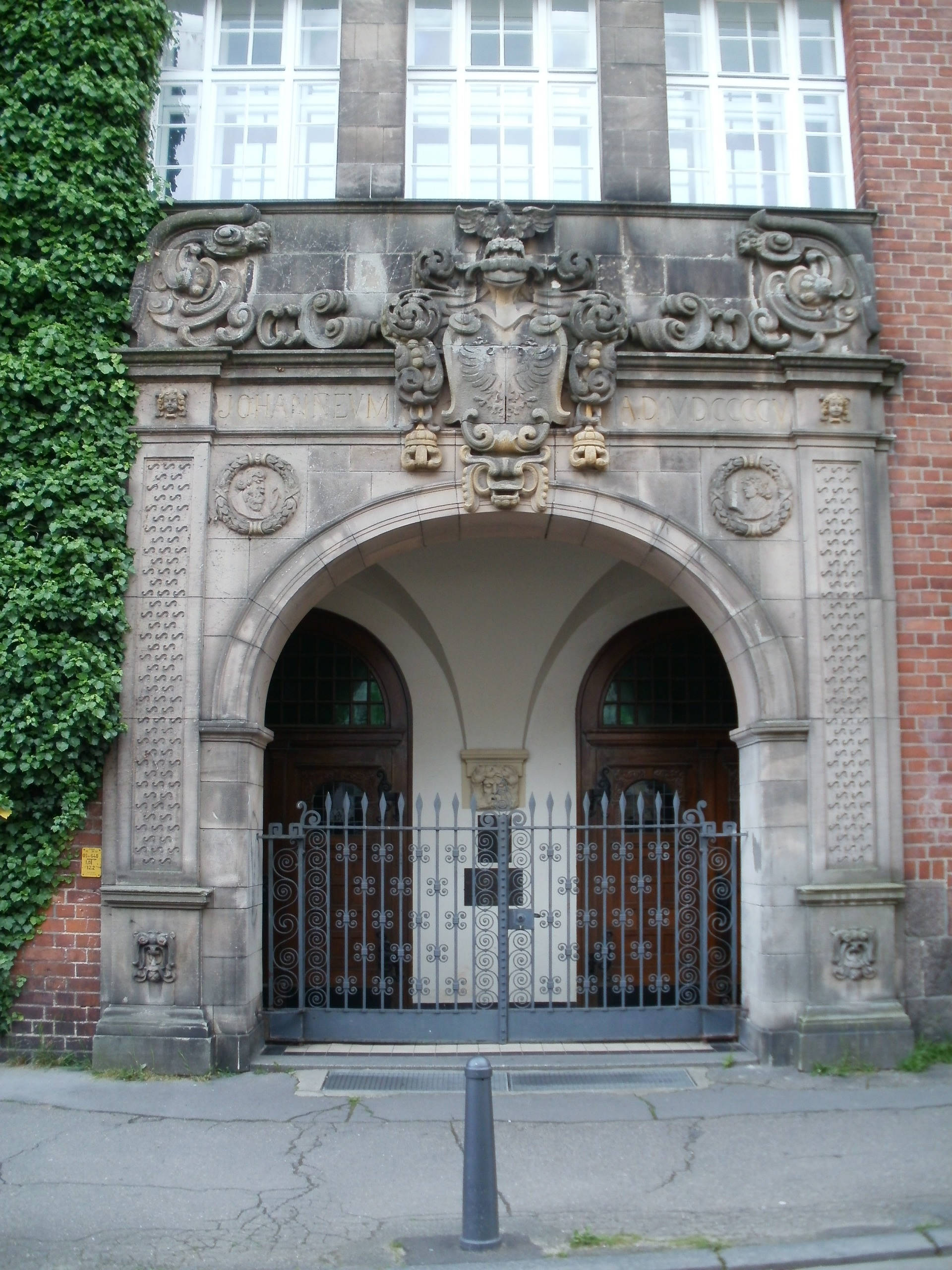 Johanneum zu Lübeck / Historisches Portal